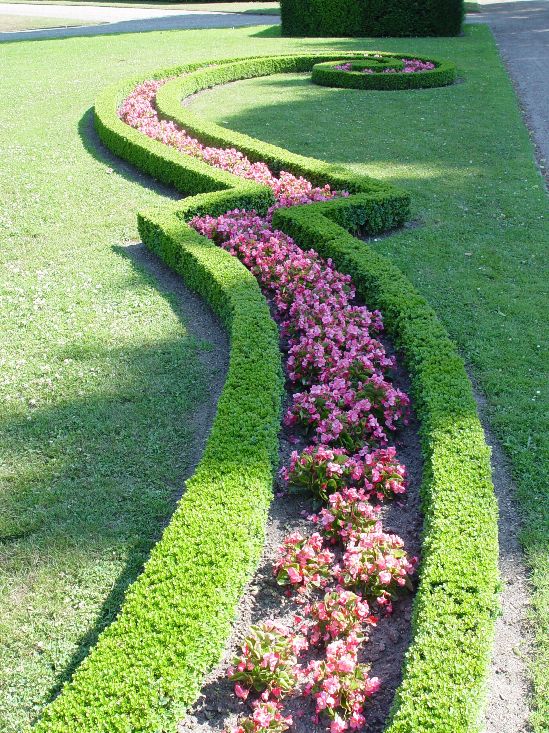 Liebe zum Detail: Herrehäuser Gärten in Hannover